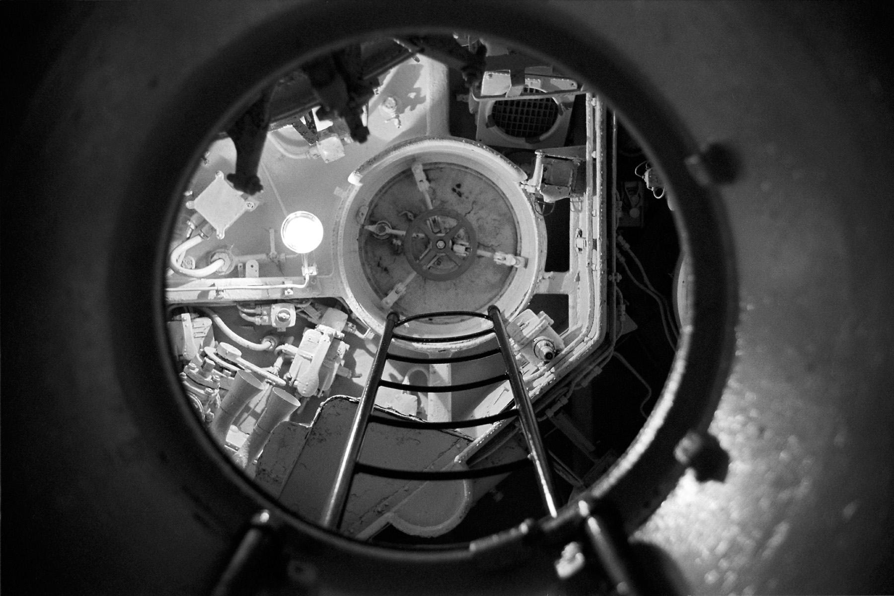 VII C U-Boot Blick aus der Zentrale in den Turm